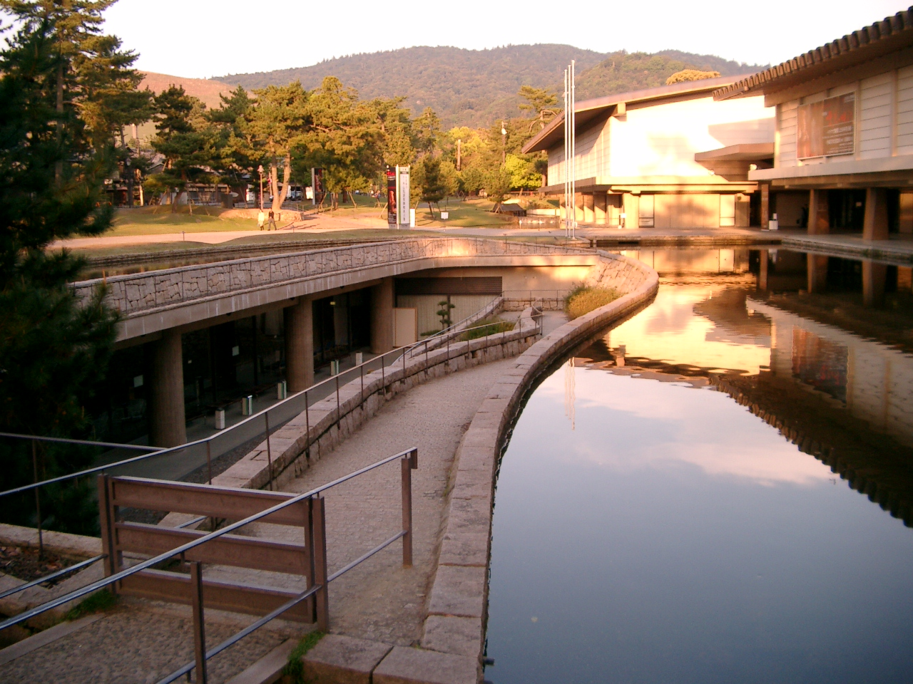 Nara Museum